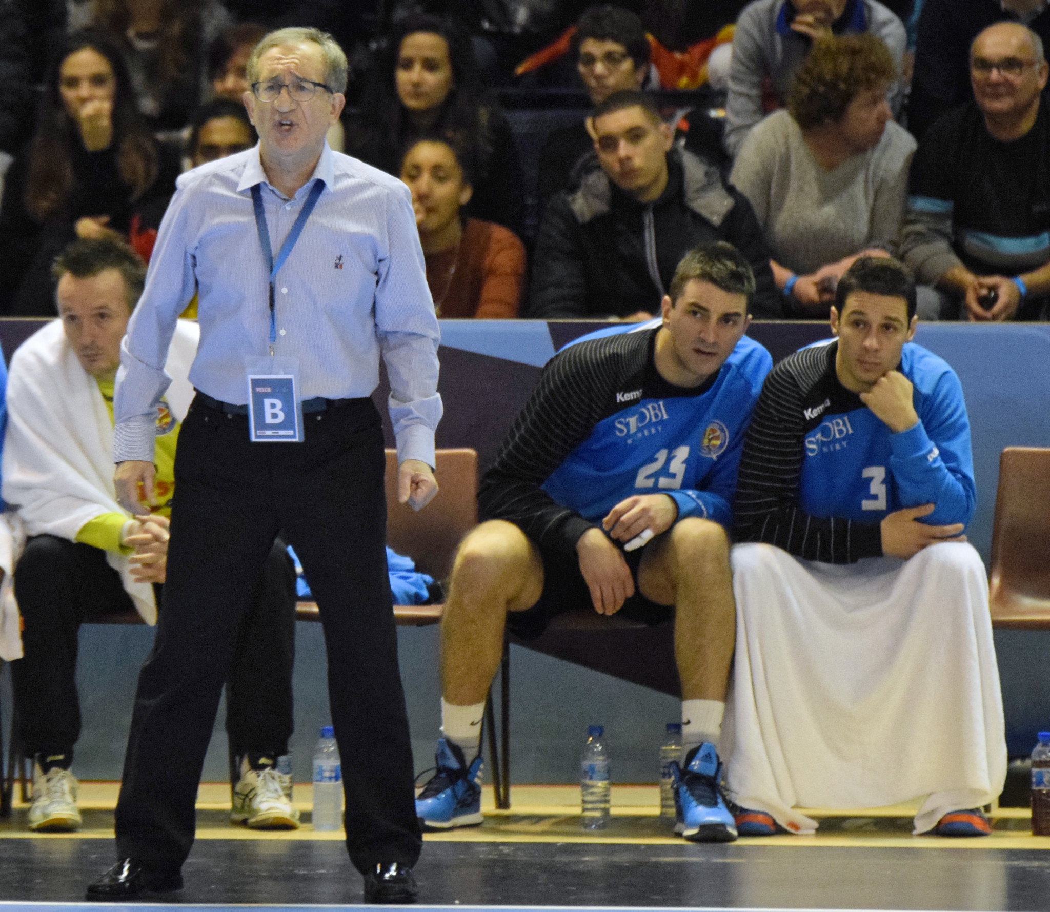 Rencontre de ligue des champions 2014-15 entre le PSG et Metalurg. A la Halle Carpentier (Paris), le 30 novembre 2014.